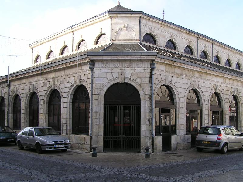 marché de Saint-Jean-d'Angély